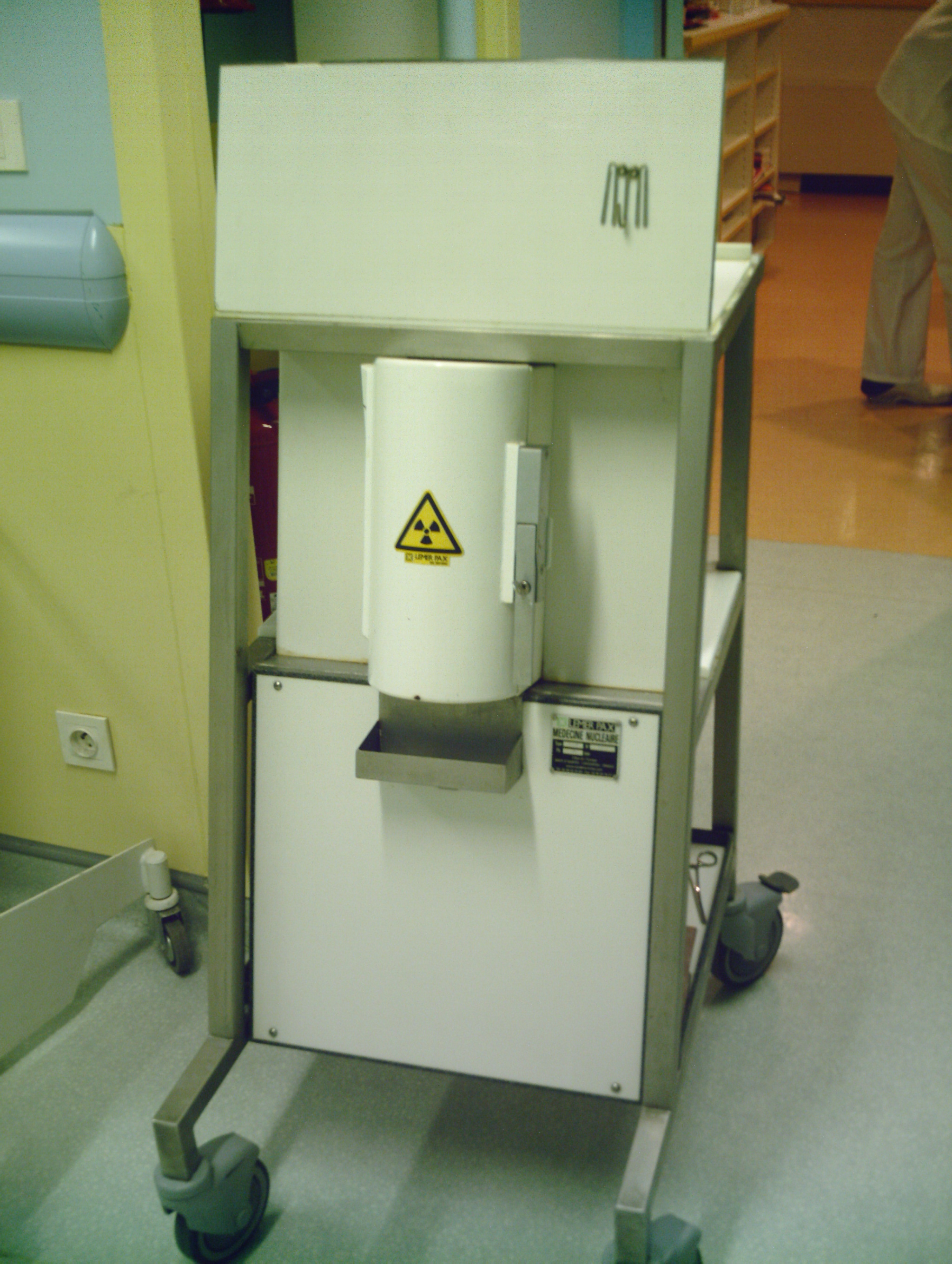 Système d'injection en médecine nucléaire pour l'acquisition d'image TEP et permettant au manipulateur en électroradiologie médicale de se protéger du rayonnement émis par la solution contenu dans la seringue.